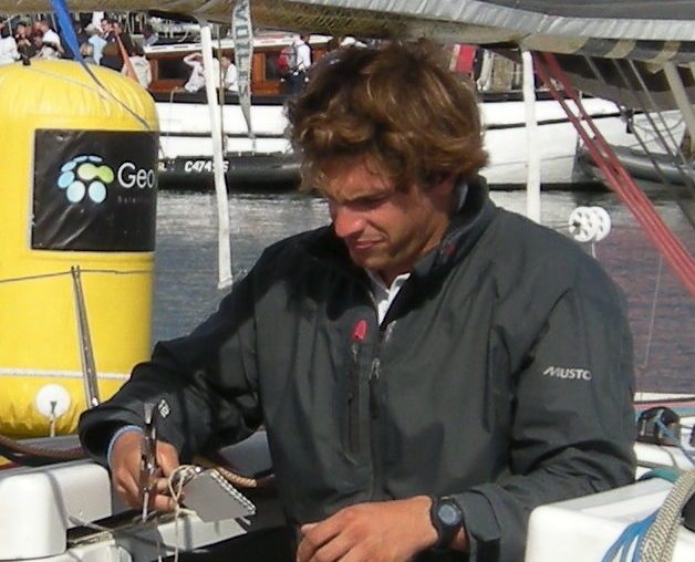 Charlie Dalin, skipper français, à Paimpol, lors de la Solitaire du Figaro 2012.